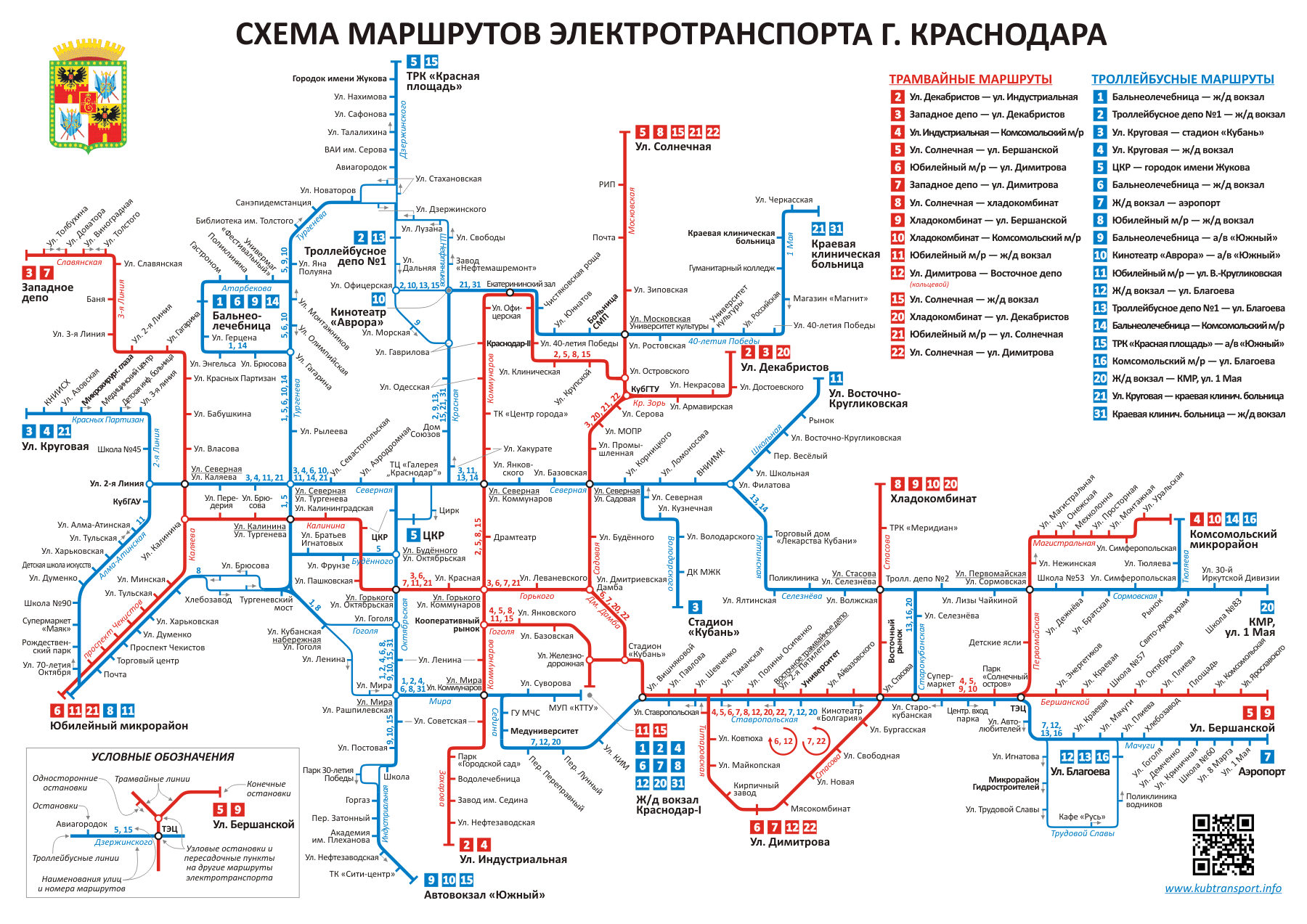 Схема движения трамваев и троллейбусов в Краснодаре